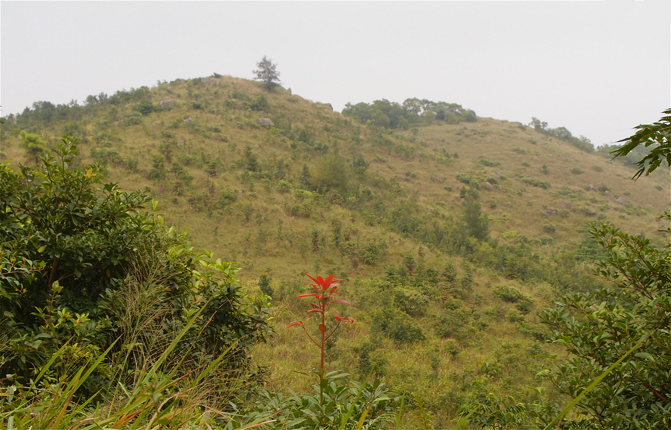 粵語: 草山，攝於植林區